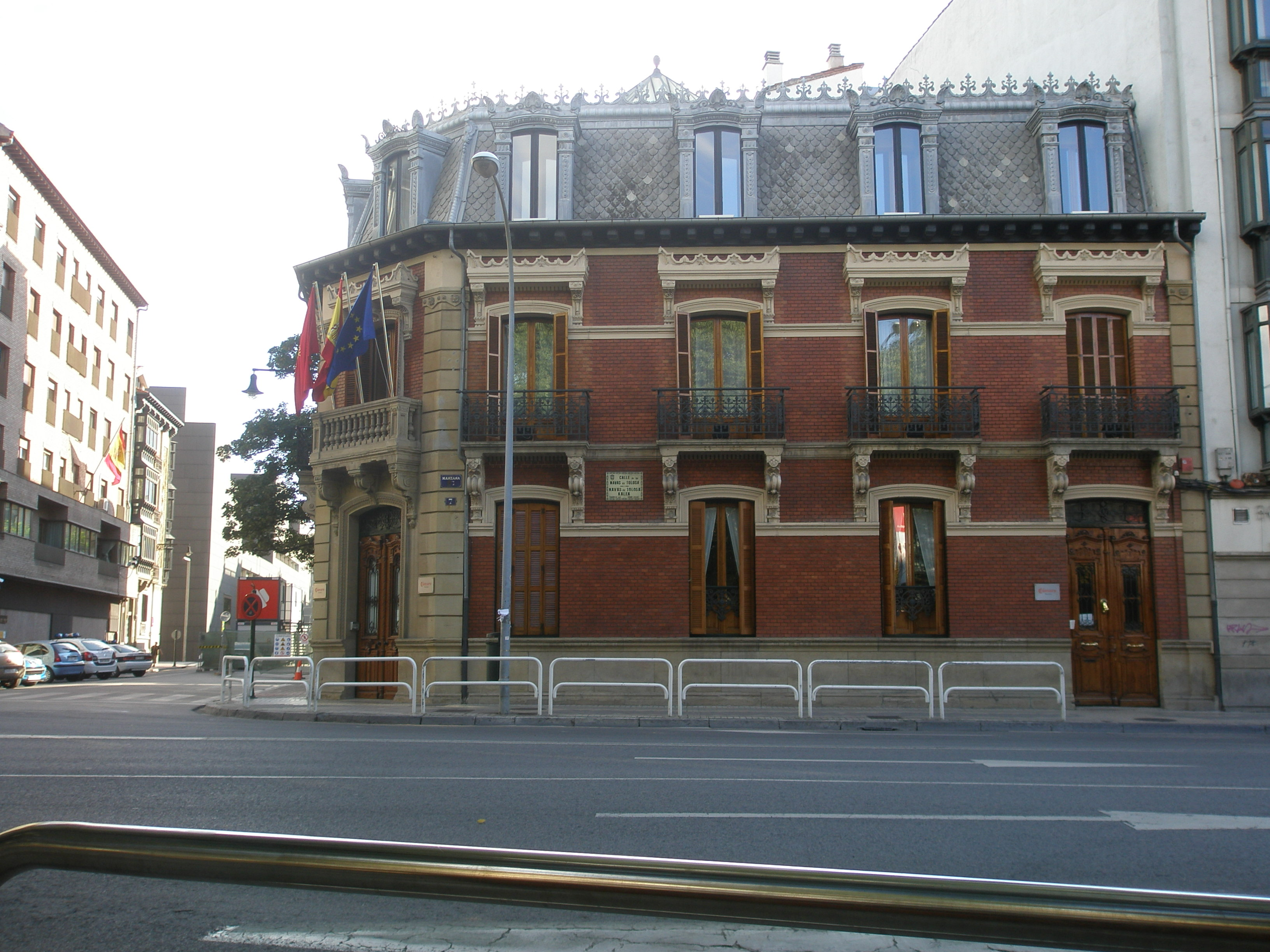 Edificio burgués de Pamplona en el Primer Ensanche, actual Cámara de Comercio.